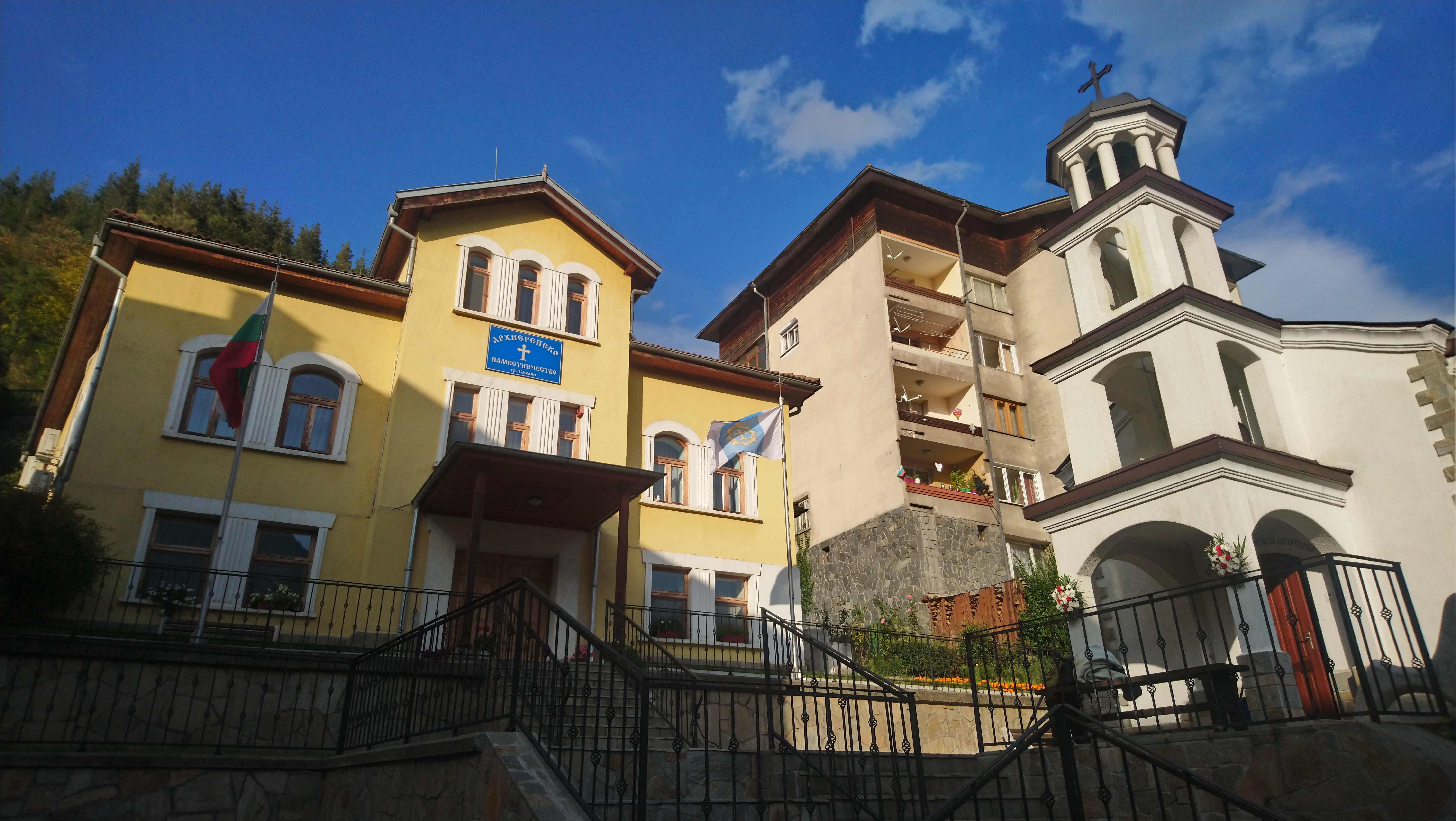 Смолян - архиерейско наместничество